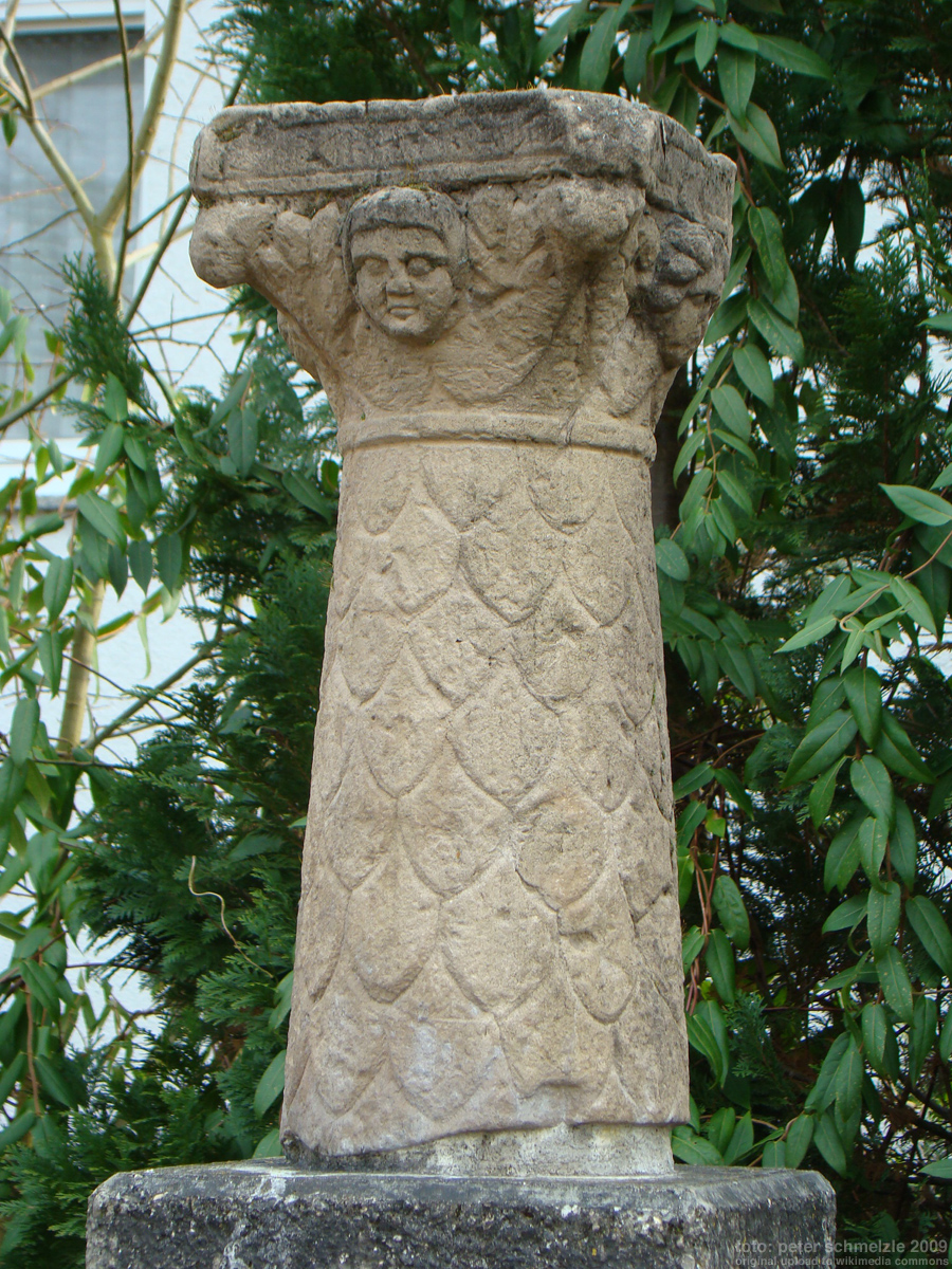 Kopie von römischen Funden im Römerbad Jagsthausen